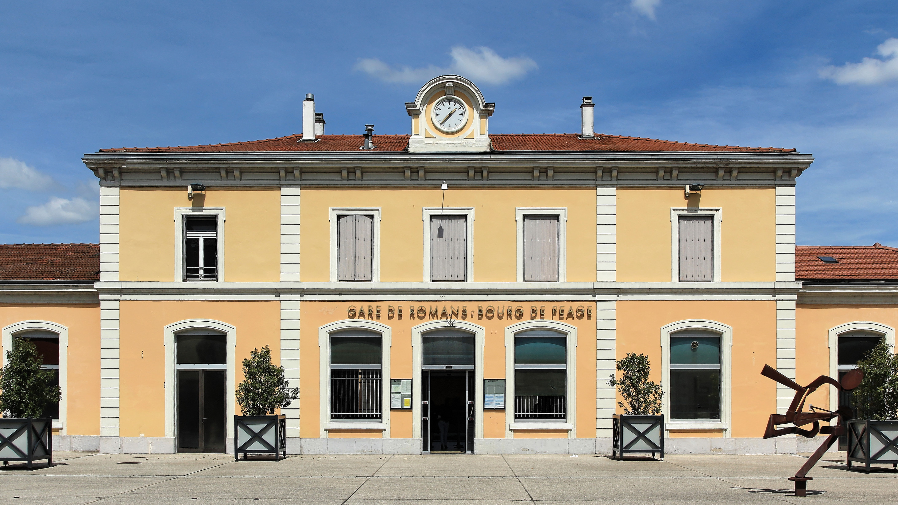 Bâtiment voyageurs de la gare de Romans - Bourg-de-Péage, sur la ligne Valence - Grenoble, dans la Drôme, en France.